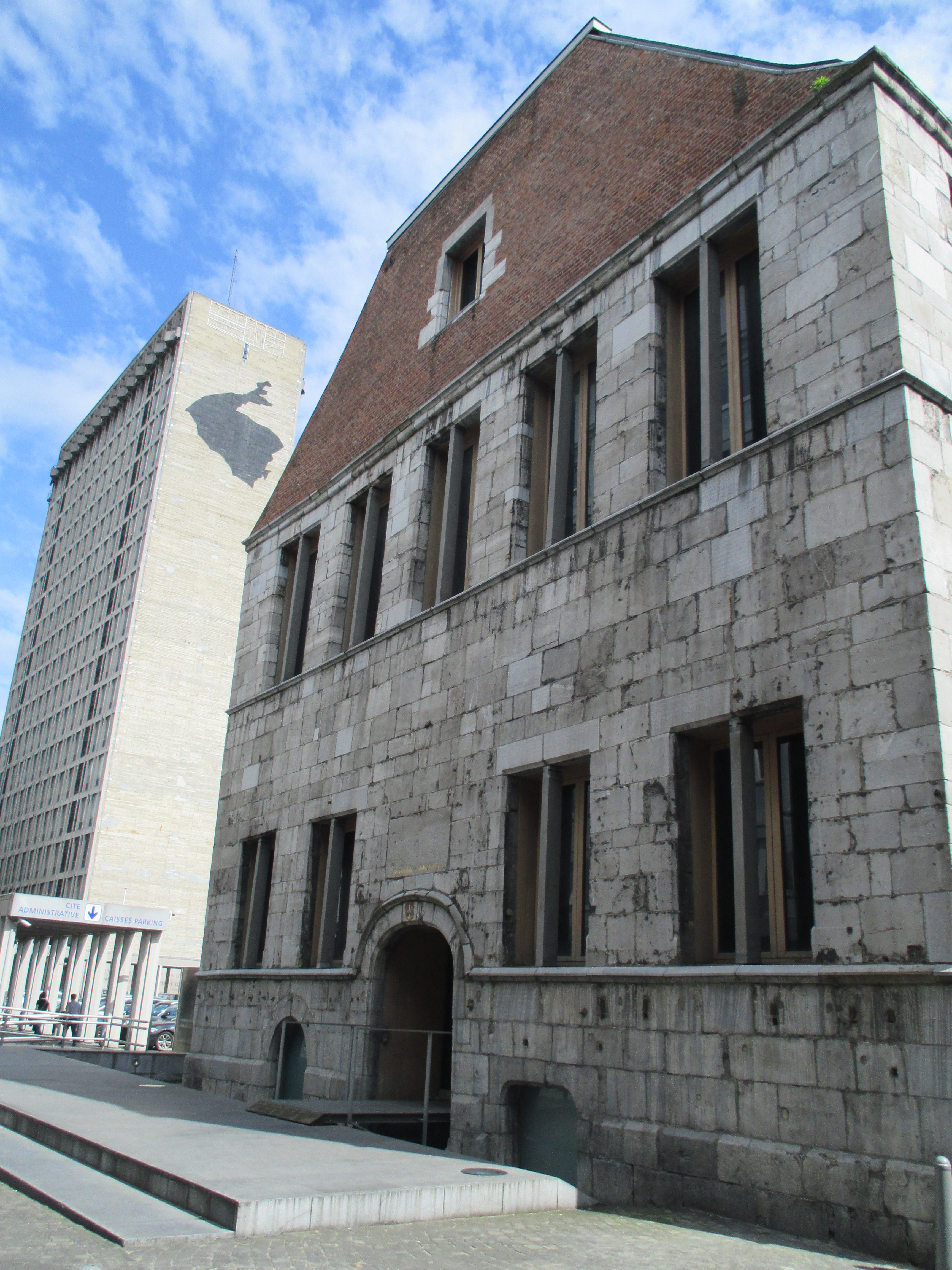 La Halle aux viandes de Liège en 2015 vue de la rue de la Boucherie